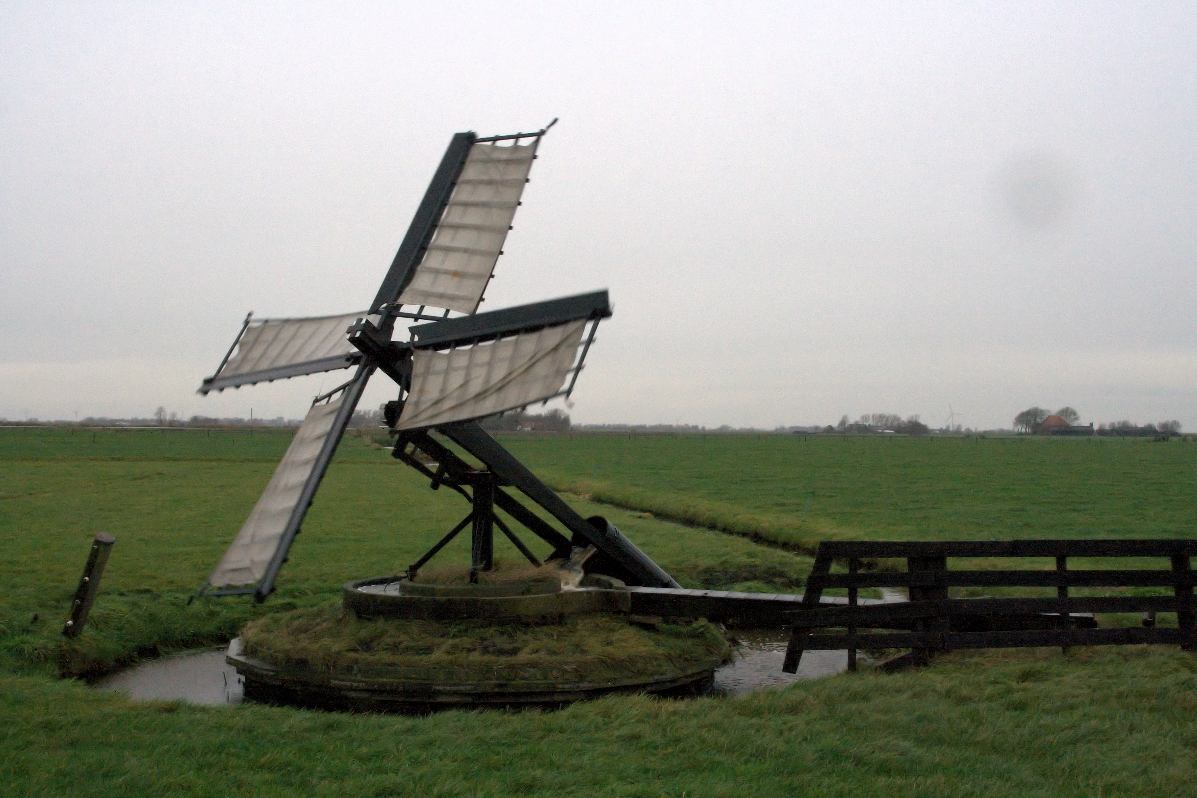 Tjasker bij It Heidenskip, malend